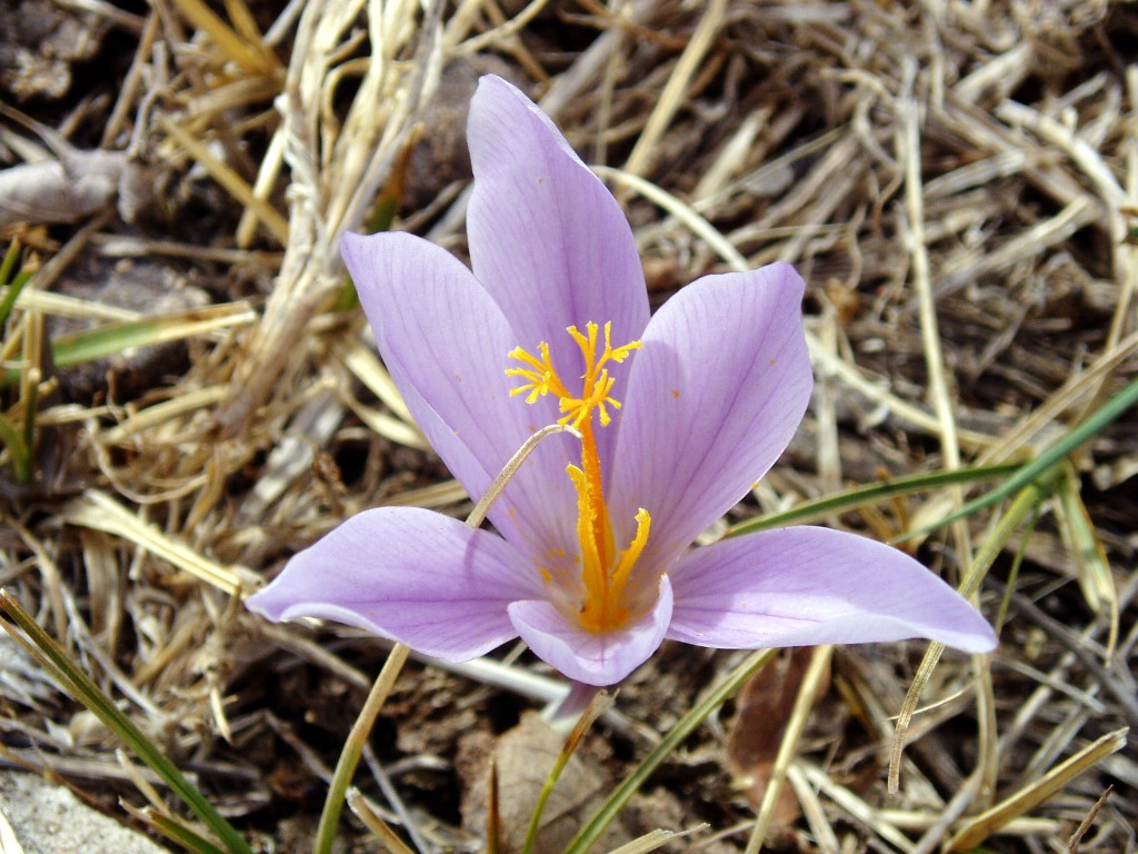 Sierra de Gibalto